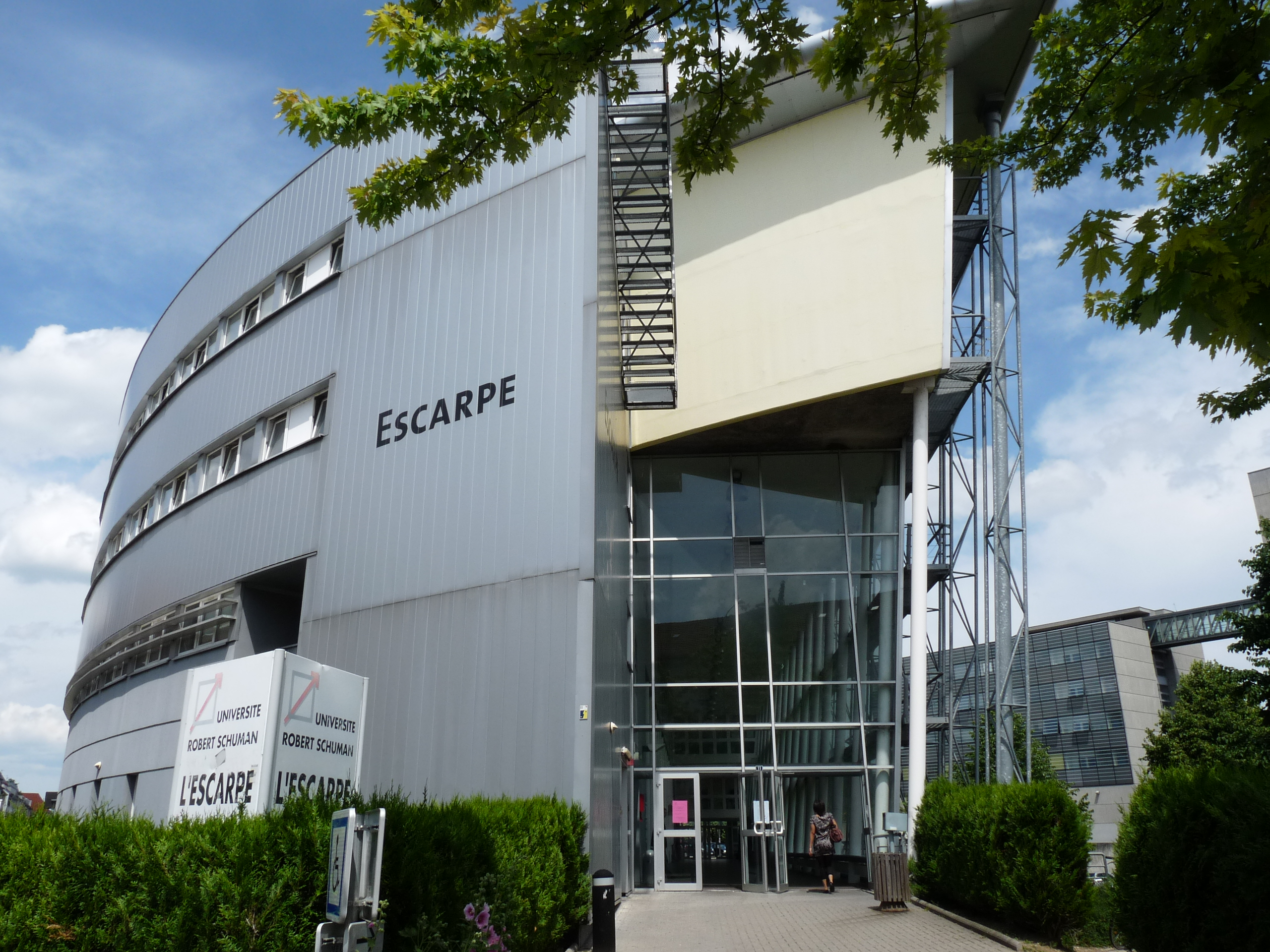 Centre universitaire d'enseignement du journalisme (CUEJ) à Strasbourg